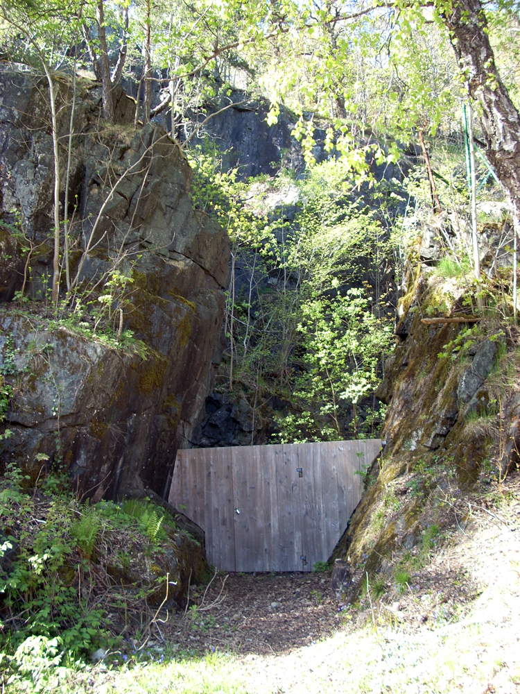 Torbjørnsbu gruver, Arendal